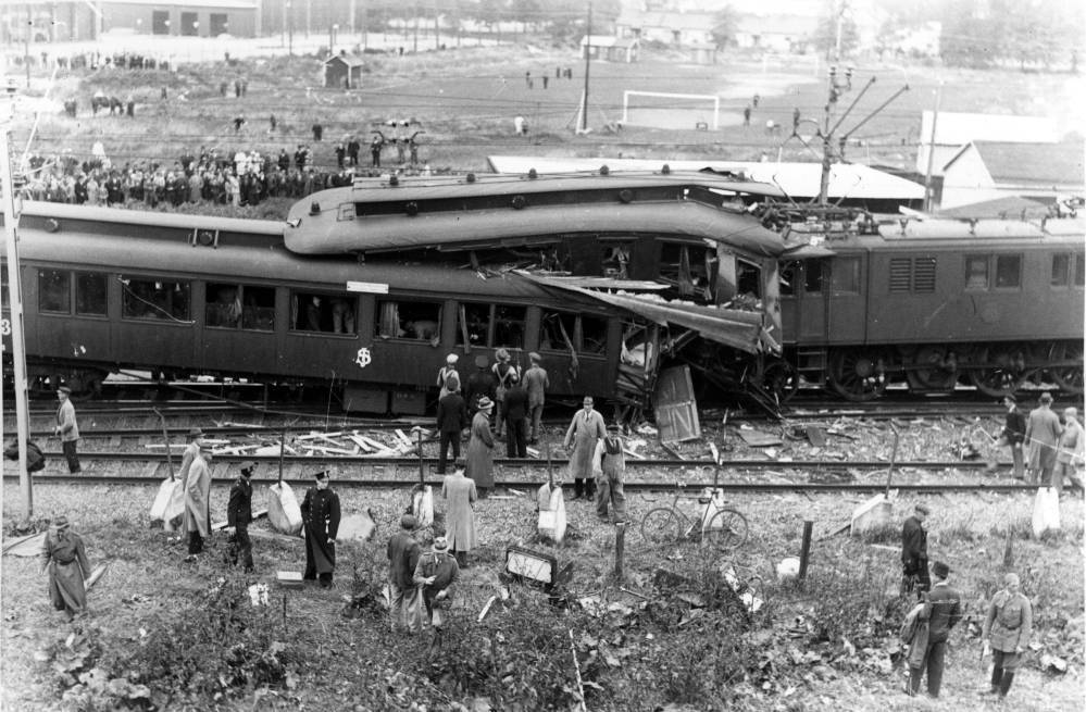 Gubbero rail accident, Sept 17, 1940